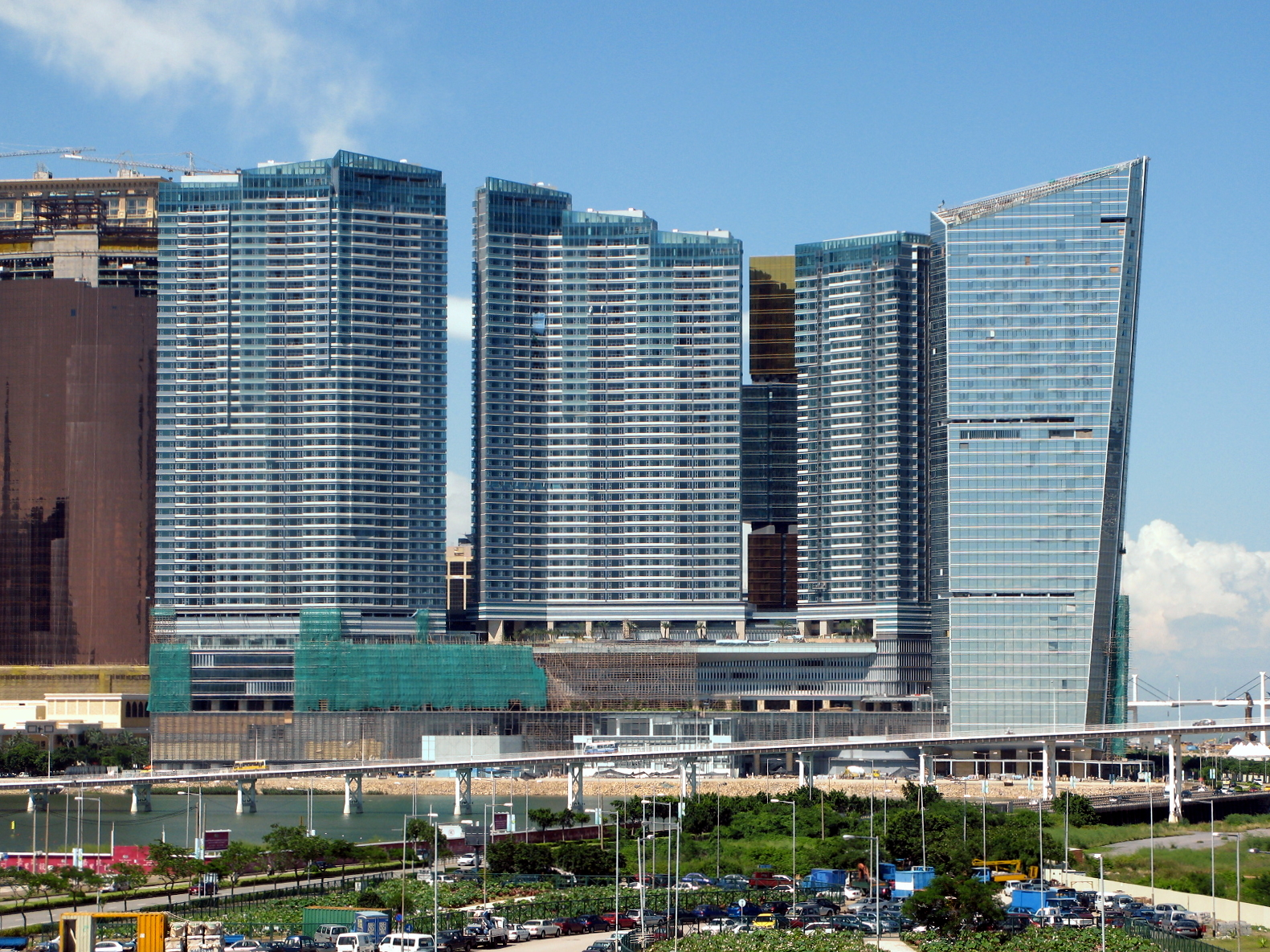 Macau One Central Plaza